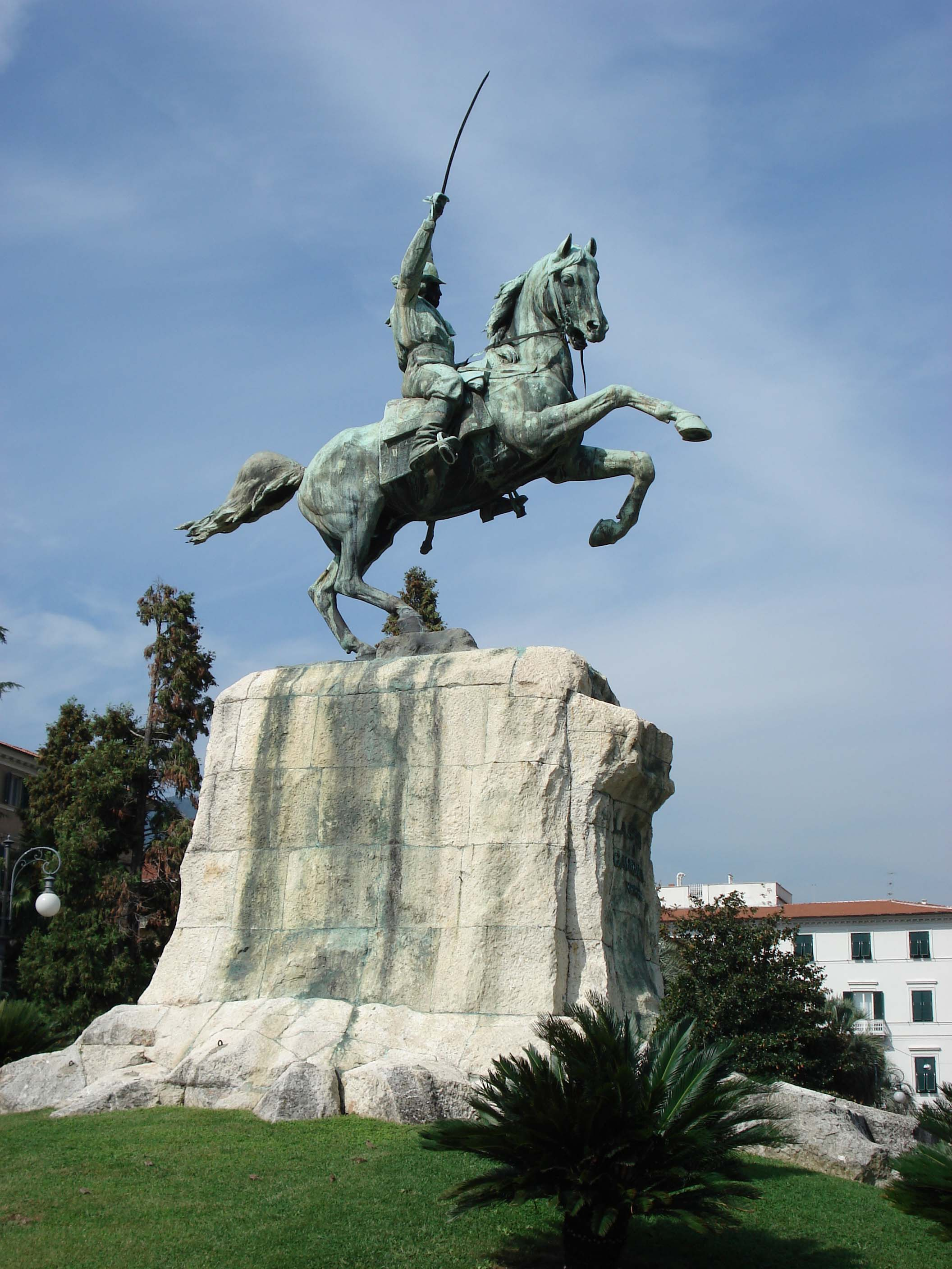 Antonio Garella, Monumento a Giuseppe Garibaldi, (1913). La Spezia - Italia.